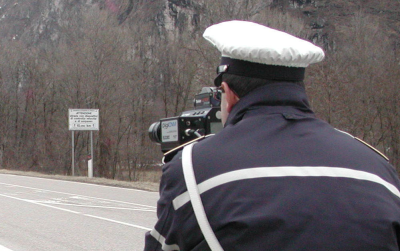 Polizia Municipale controlli telelaser